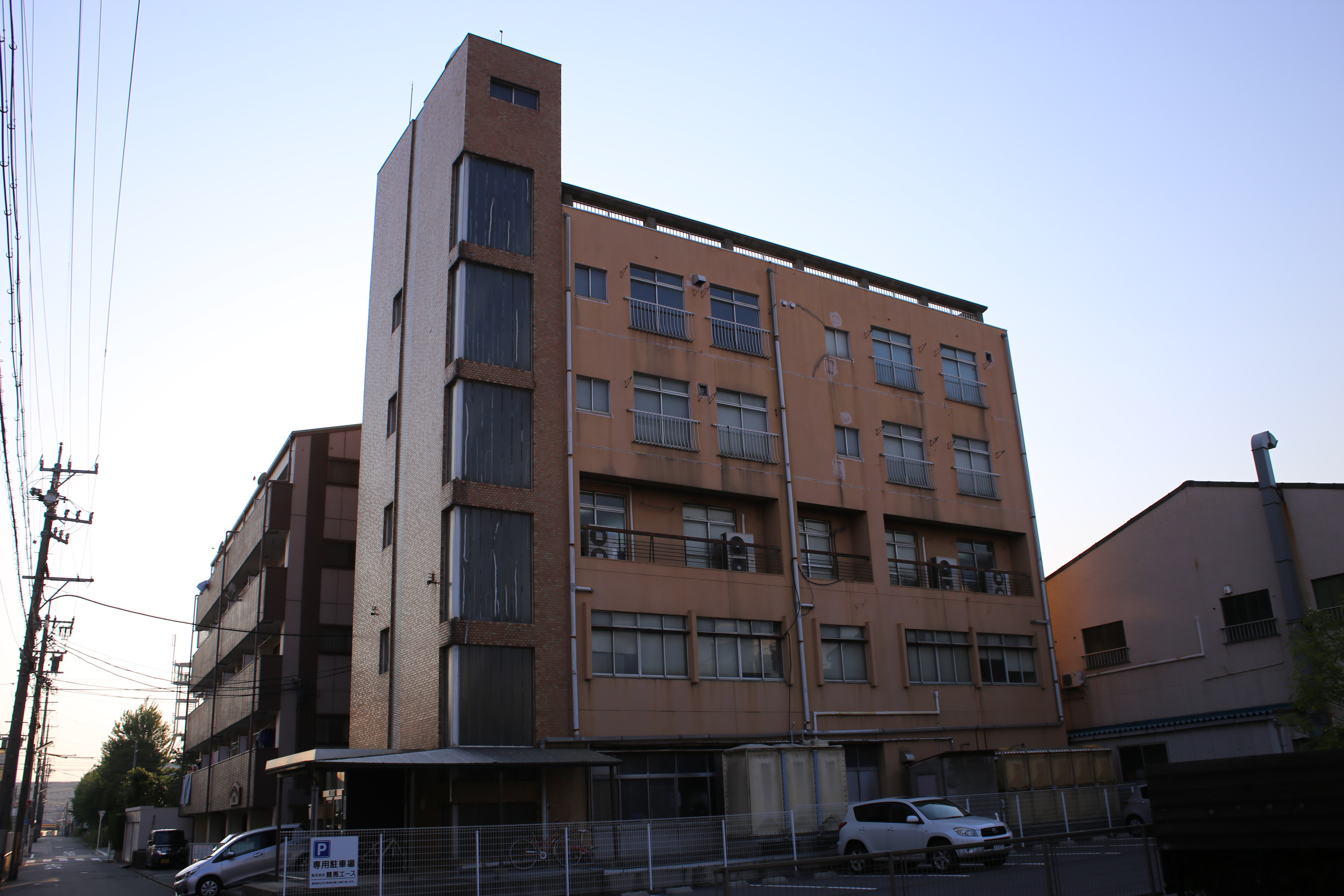 名古屋市港区須成町の競馬エース本社を南側公道東側より撮影